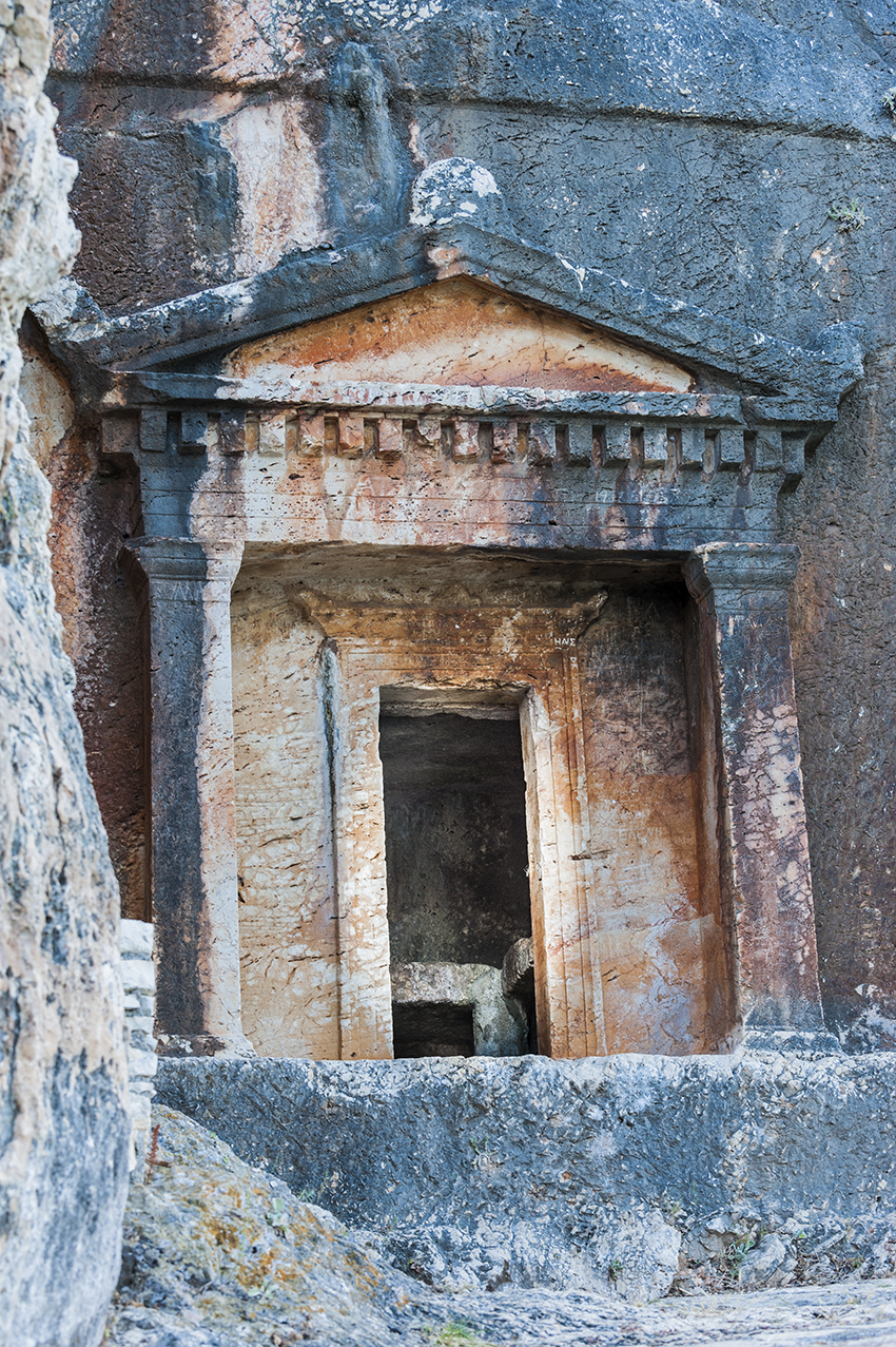 Λυκιακός τάφος